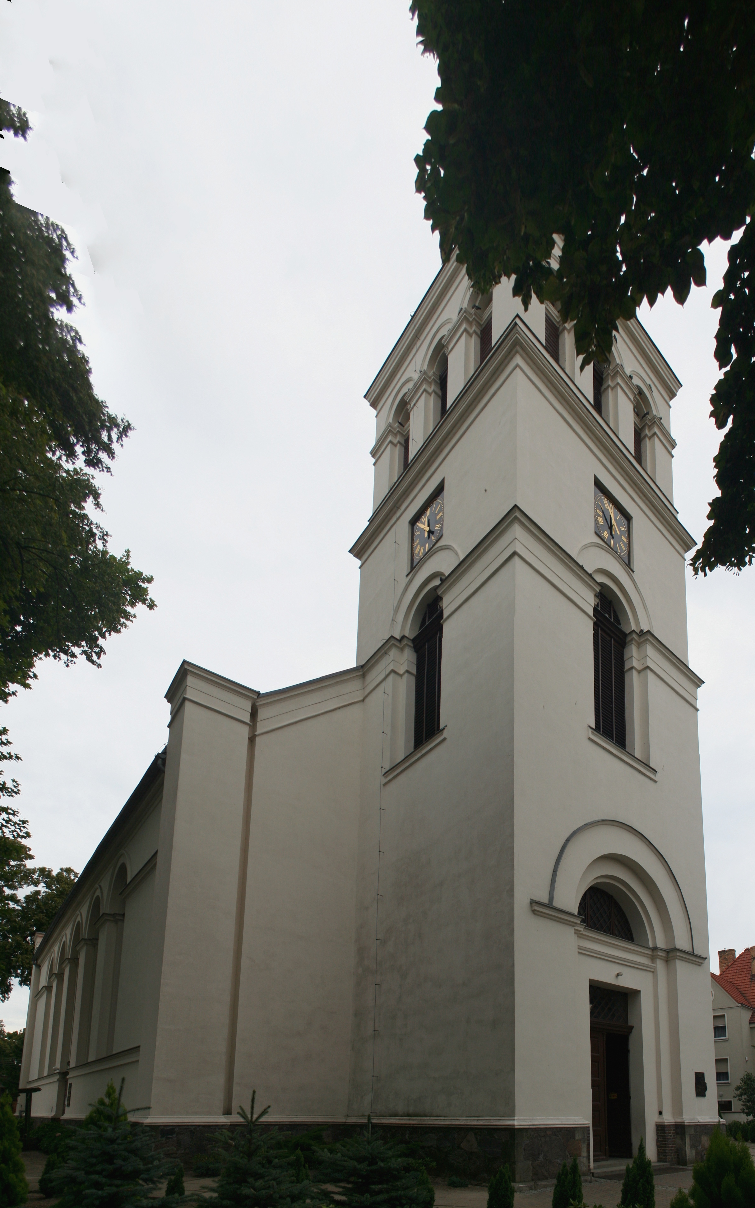 Międzychód, ul. Piłsudskiego. Kościół ewangelicki, ob. rzym.-kat. par. p.w. Niepokalanego Serca Maryi, 1838.